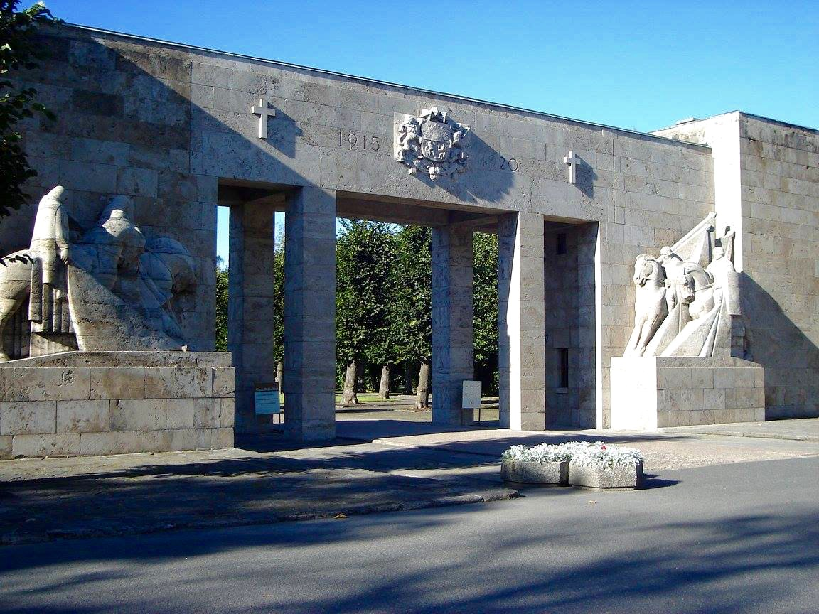 Brāļu kapi, Rīga, Aizsaules iela 1b